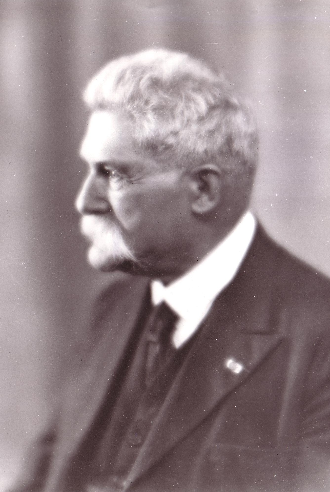 Général Hirschauer